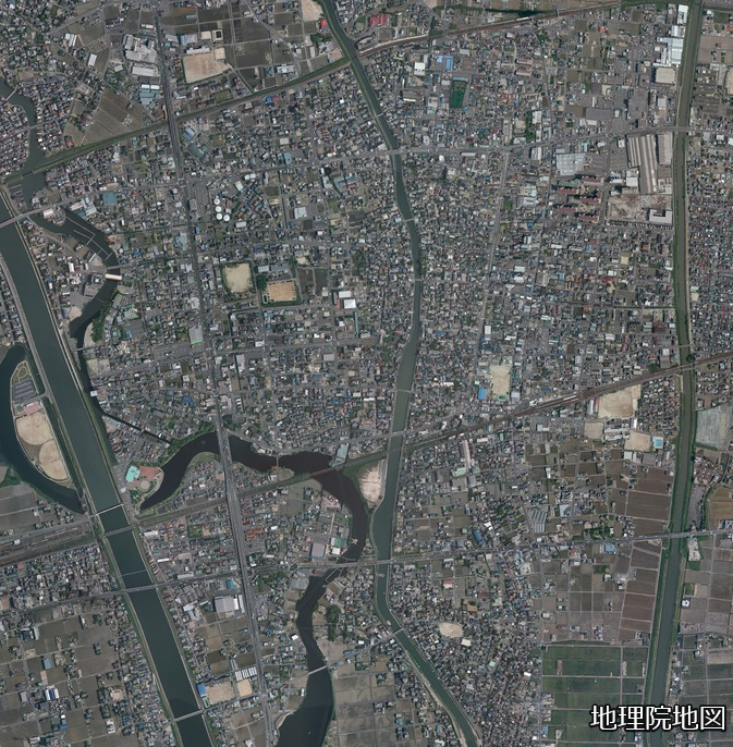 愛知県海部郡蟹江町の航空写真